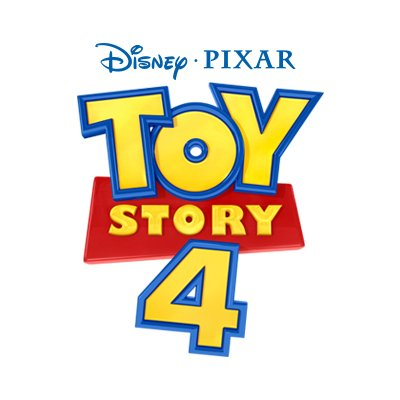 Logo original du film d'animation Toy Story 4 réalisé par Josh Cooley, prévu pour 2019.